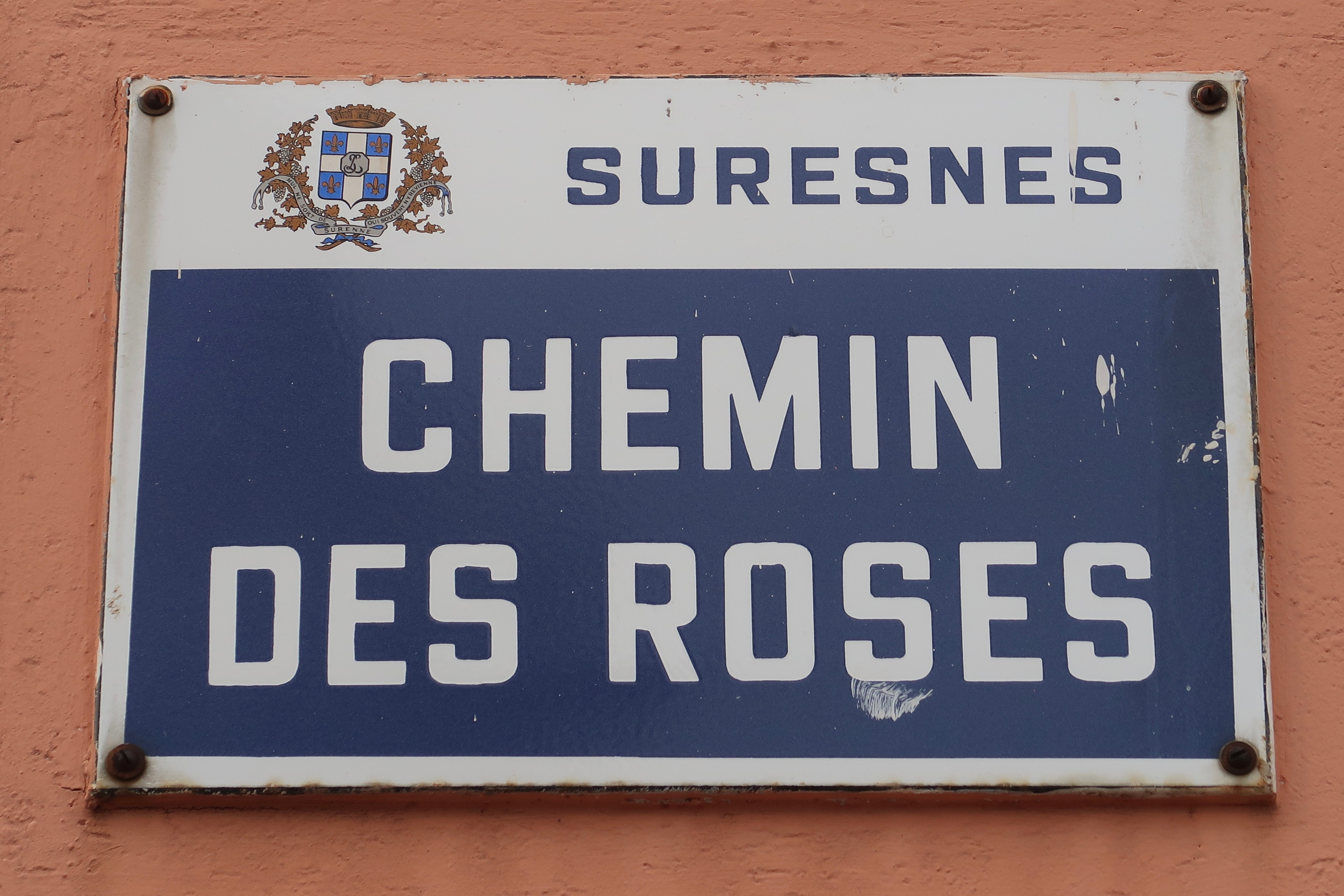 Plaque du chemin des Roses à Suresnes (Hauts-de-Seine).